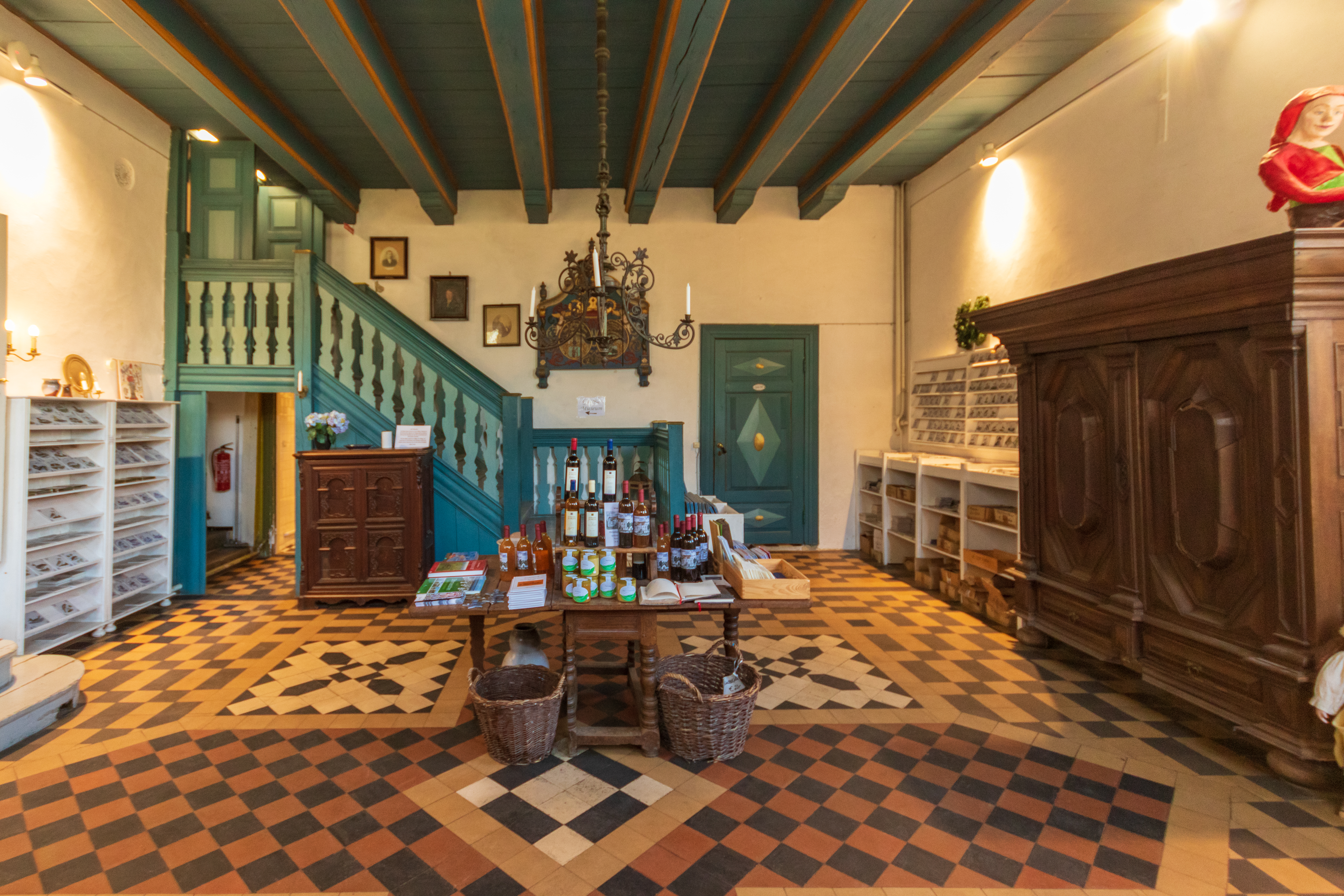 Herrenhaus Hoyerswort - Diele